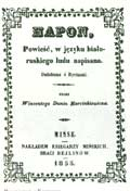 Вінцэнт Дунін-Марцінкевіч. "Гапон". Аповесць, на мове беларускага люду напісаная. Мінск: Выданне братоў Бэйлінаў, друк Ё. Дворца, 1855.